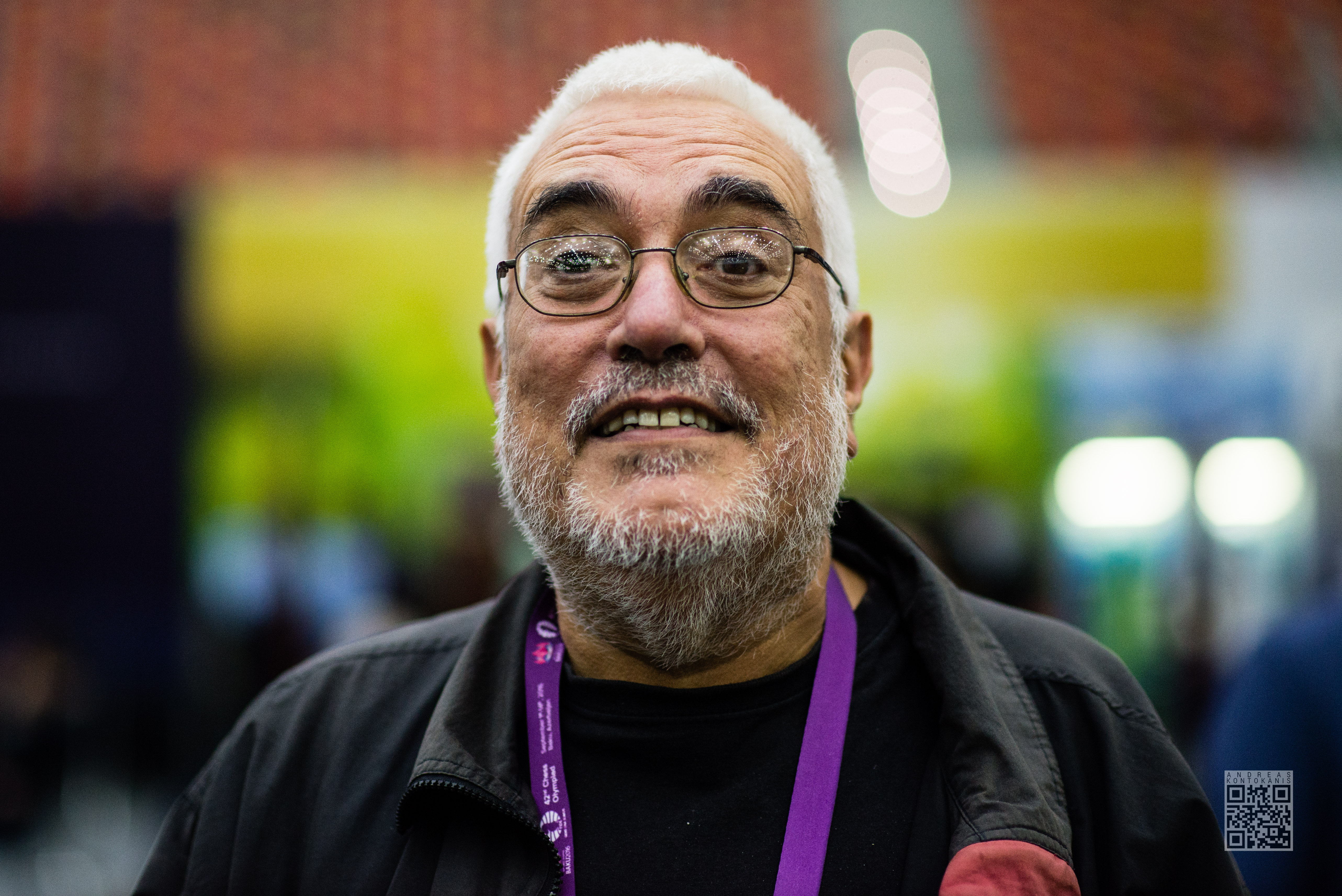 Skembris Spyridon